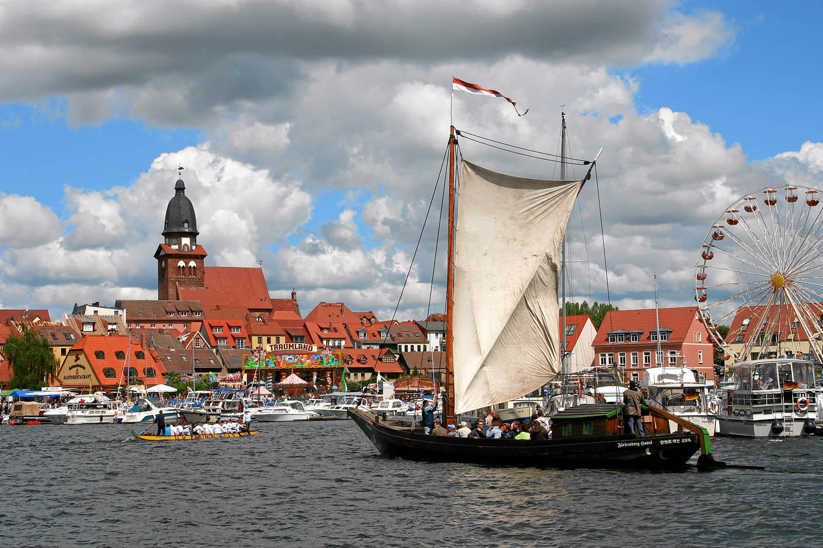 Nachbau eines historischen Kaffenkahns unter Segel auf der Müritz vor der Stadt Waren.